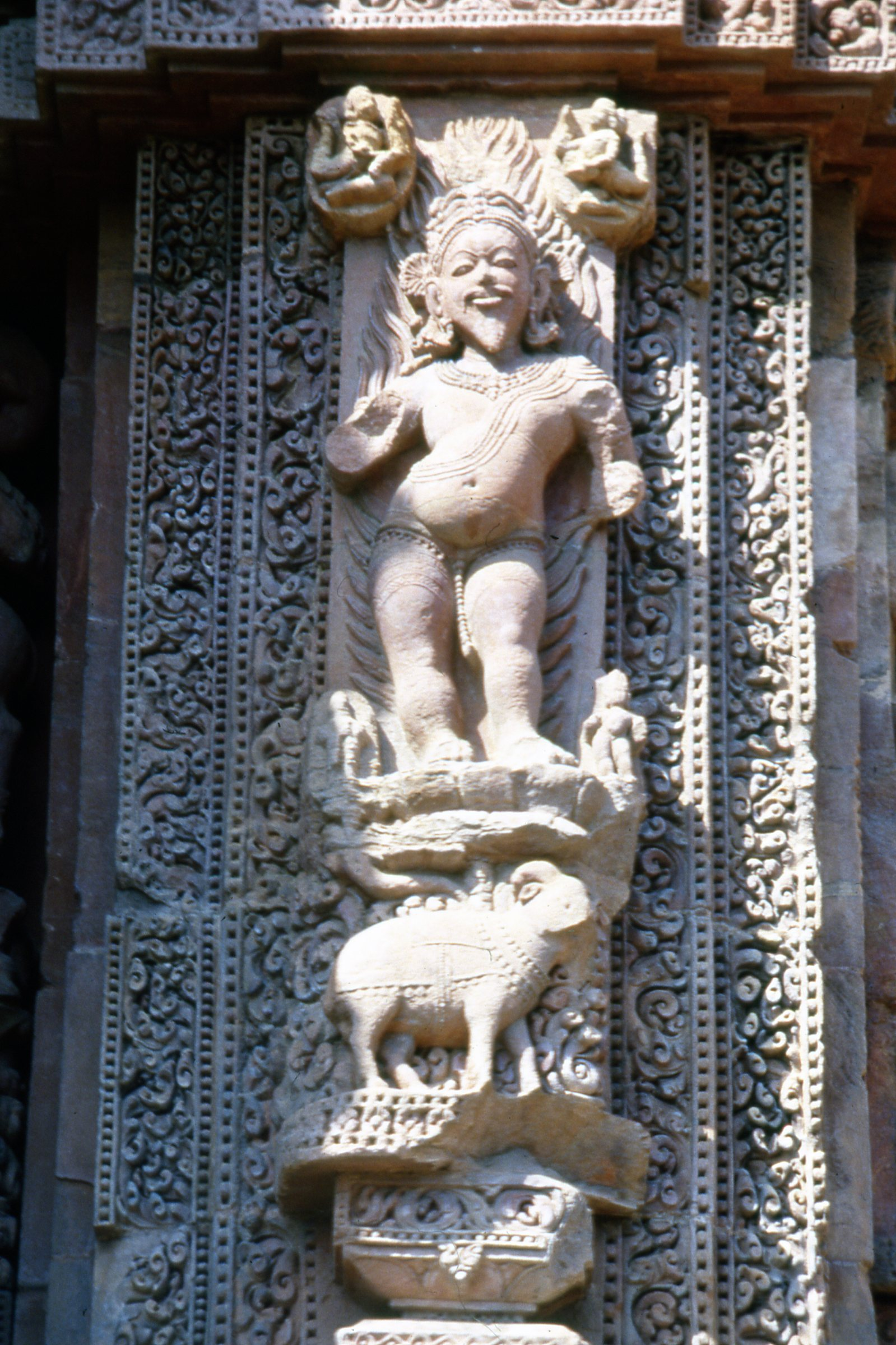 Siglo XI, Templo Rajarani/Templo Indreswara, Escultura de Agni dios del fuego en el hinduismo. Bhuvanesvar,Orissa, India.